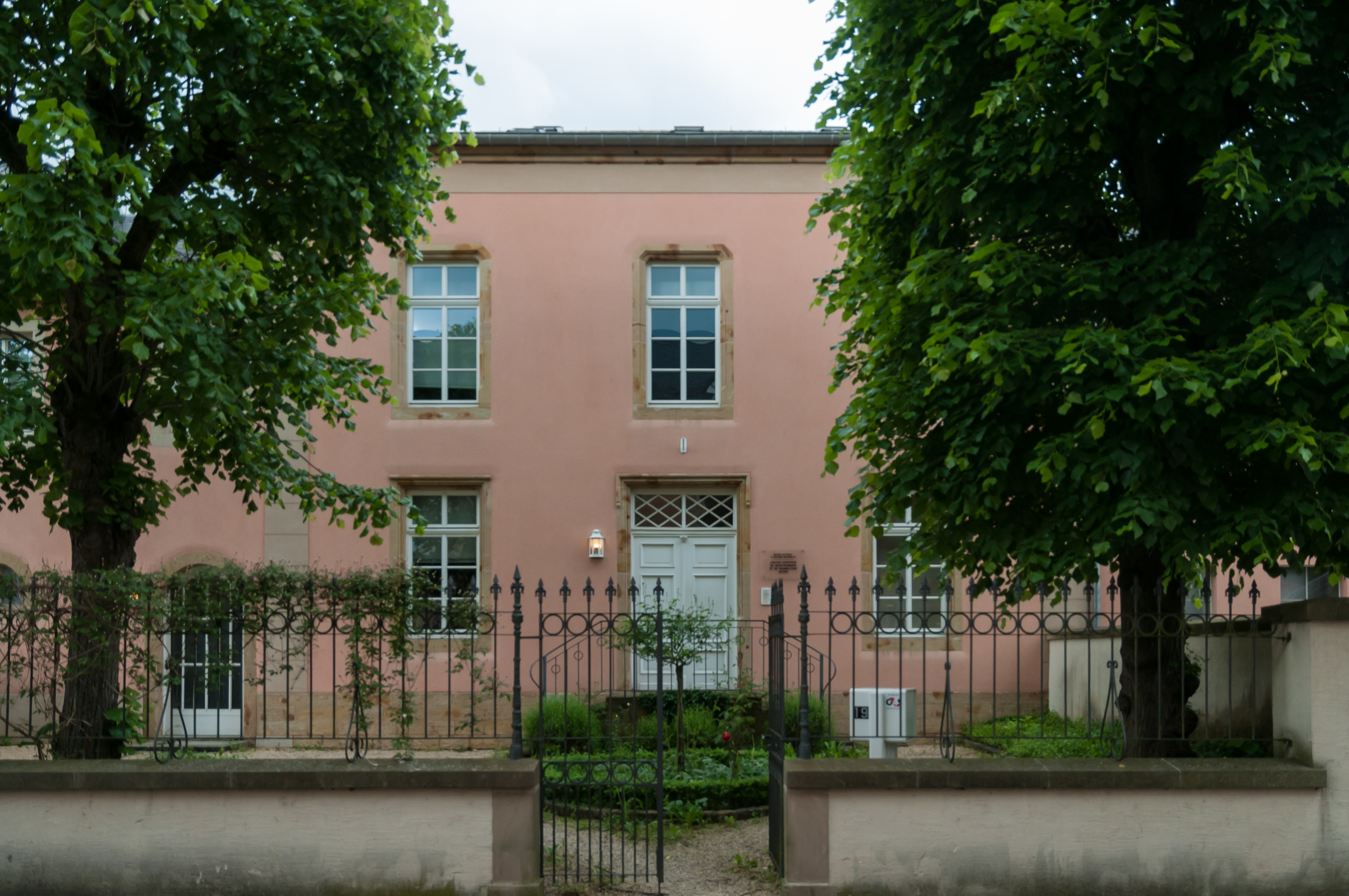 De Centre européen de géodynamique et de séismologie, 19, rue Josy-Welter zu Walfer.